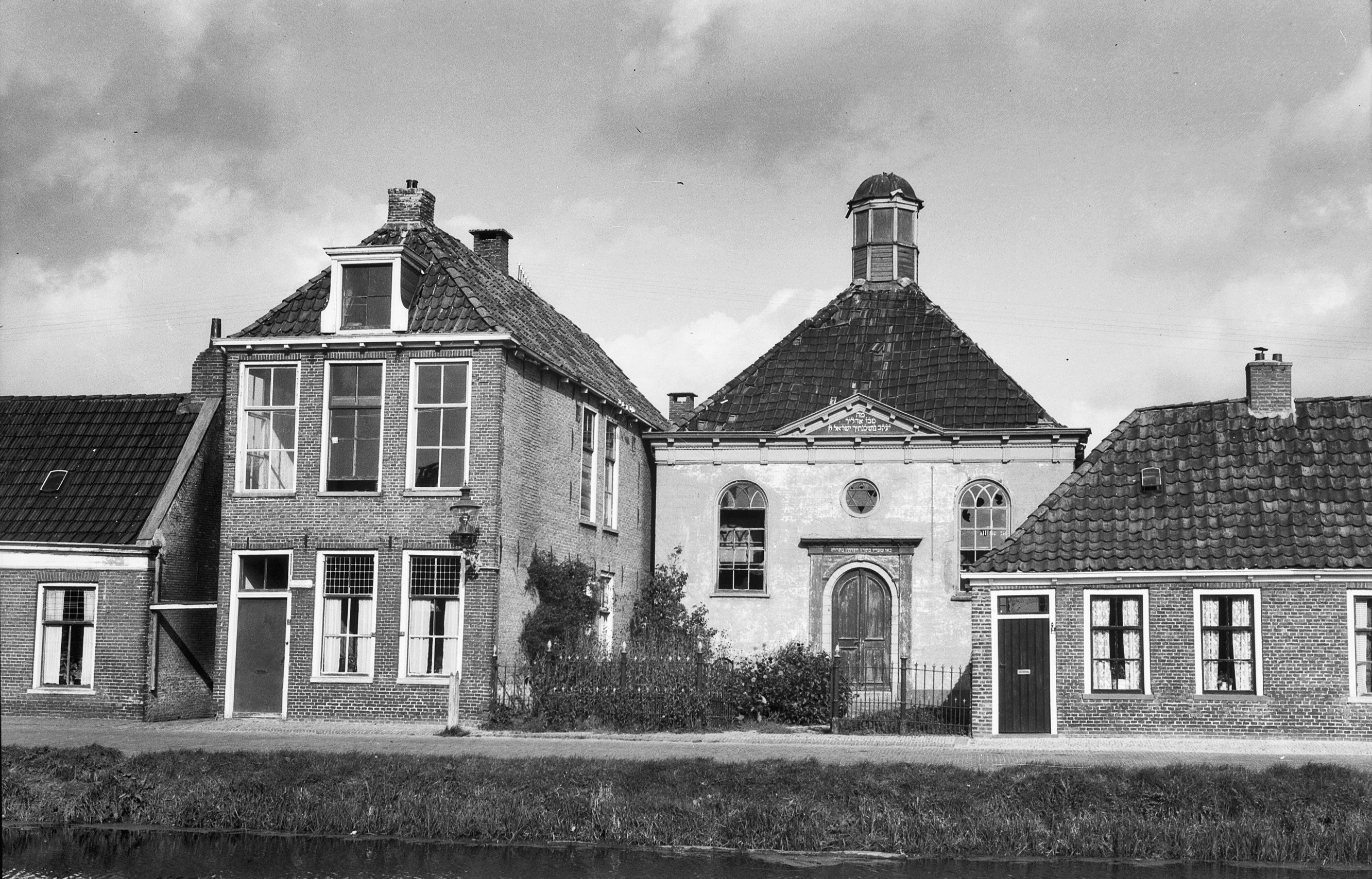 Synagoge: voorzijde